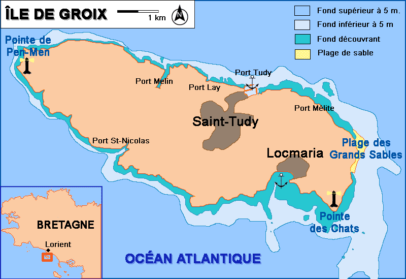 Description : Plan sommaire l'ile de Groix Date : 2006 Lieu : Ile de Groix, Bretagne, France Author : Réalisation Pline